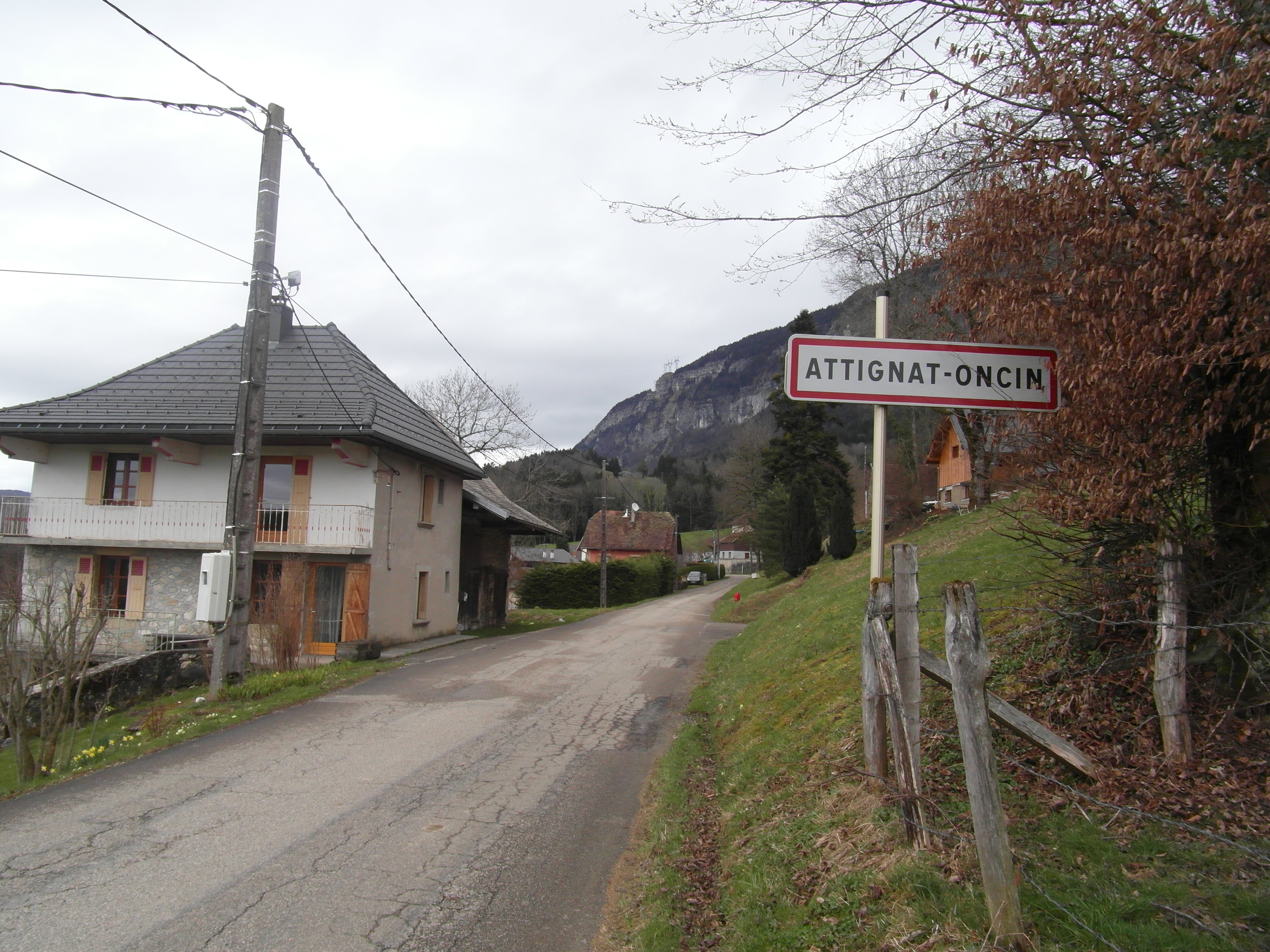 Entrée de la commune d'Attignat-Oncin